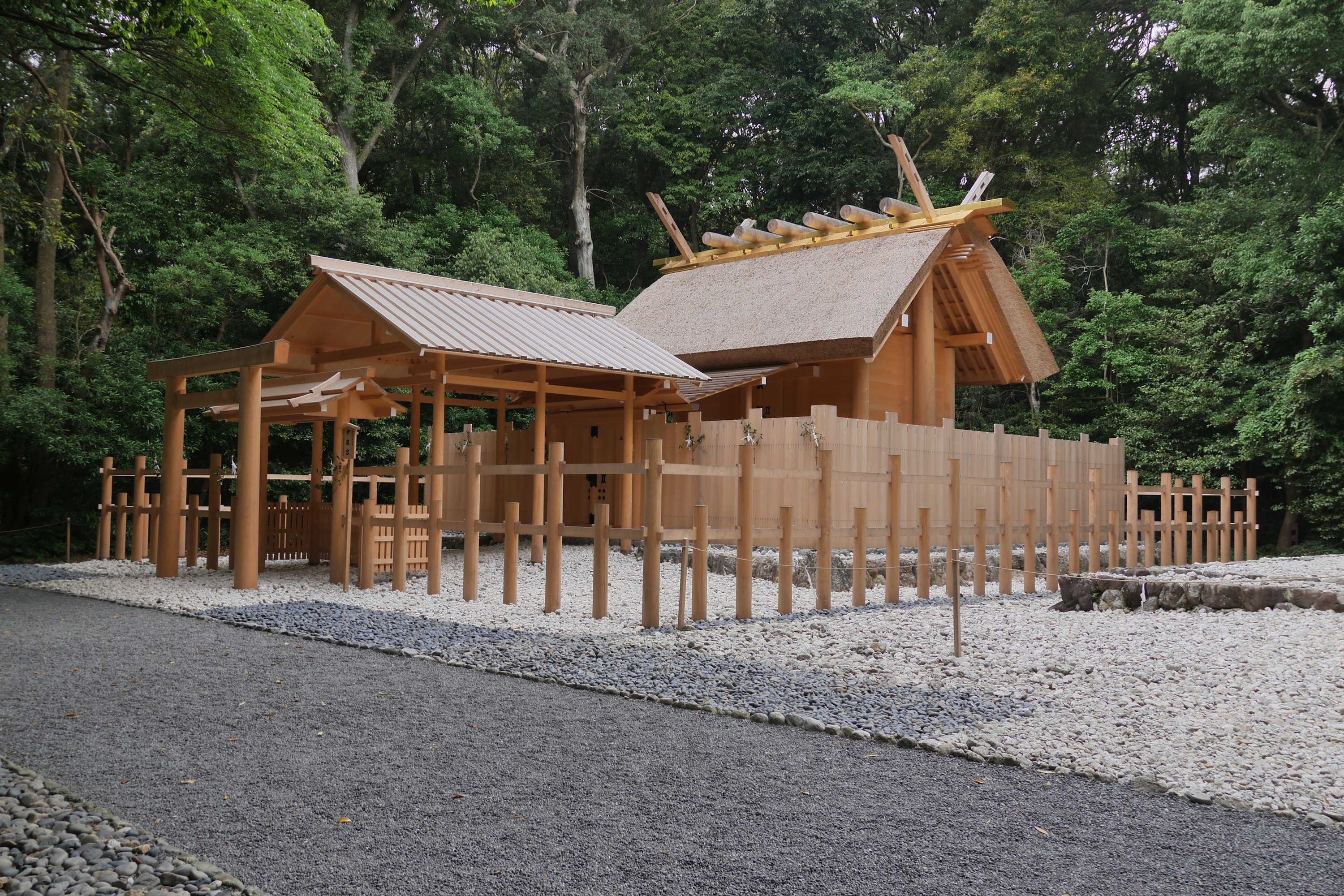 日本の三重県志摩市にある皇大神宮別月伊雑宮社殿。